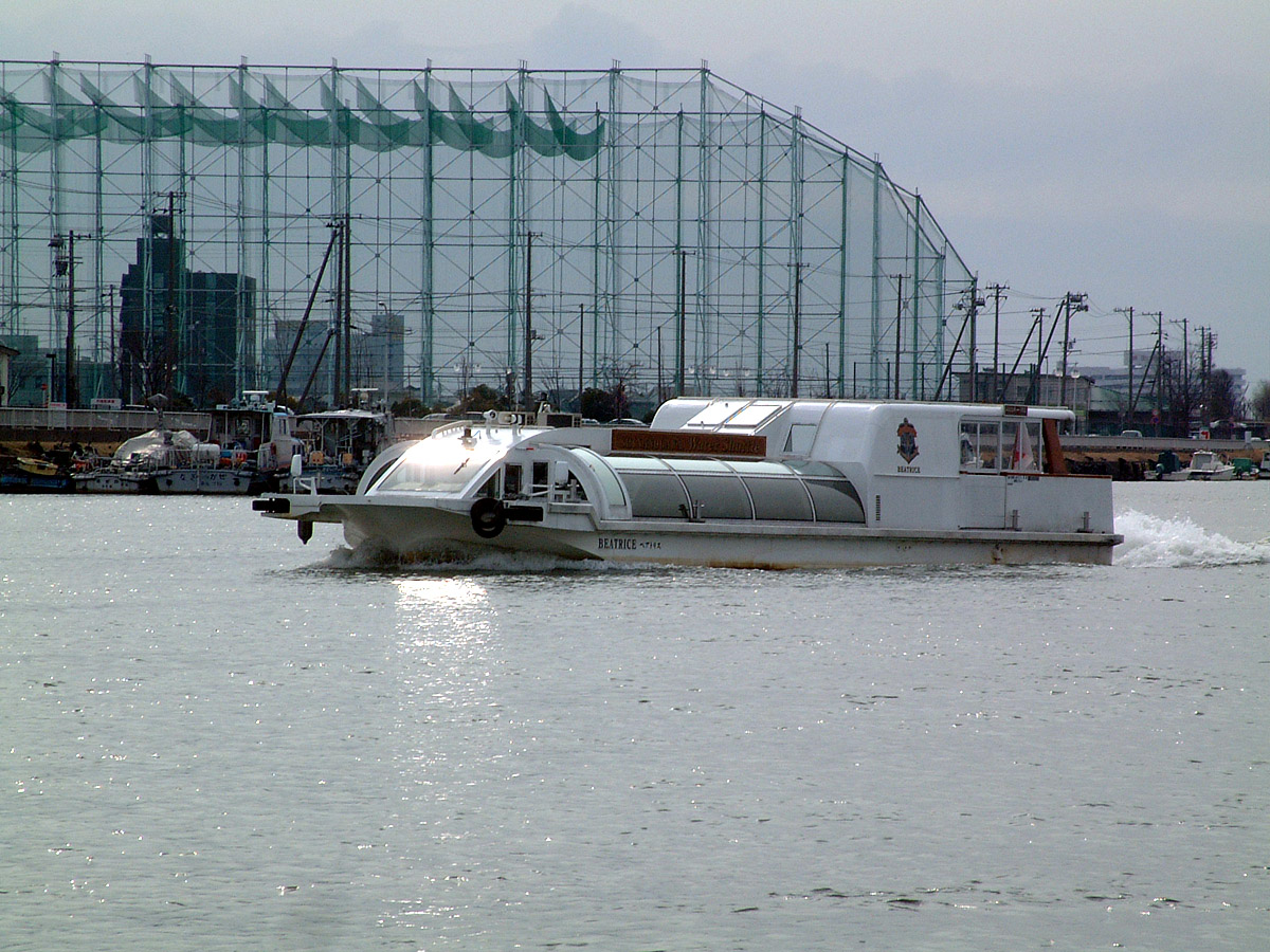 信濃川の河口、新潟市で運行される信濃川ウォーターシャトルの船舶、「ベアトリス」号。 僚船「アナスタシア」号デッキより撮影。